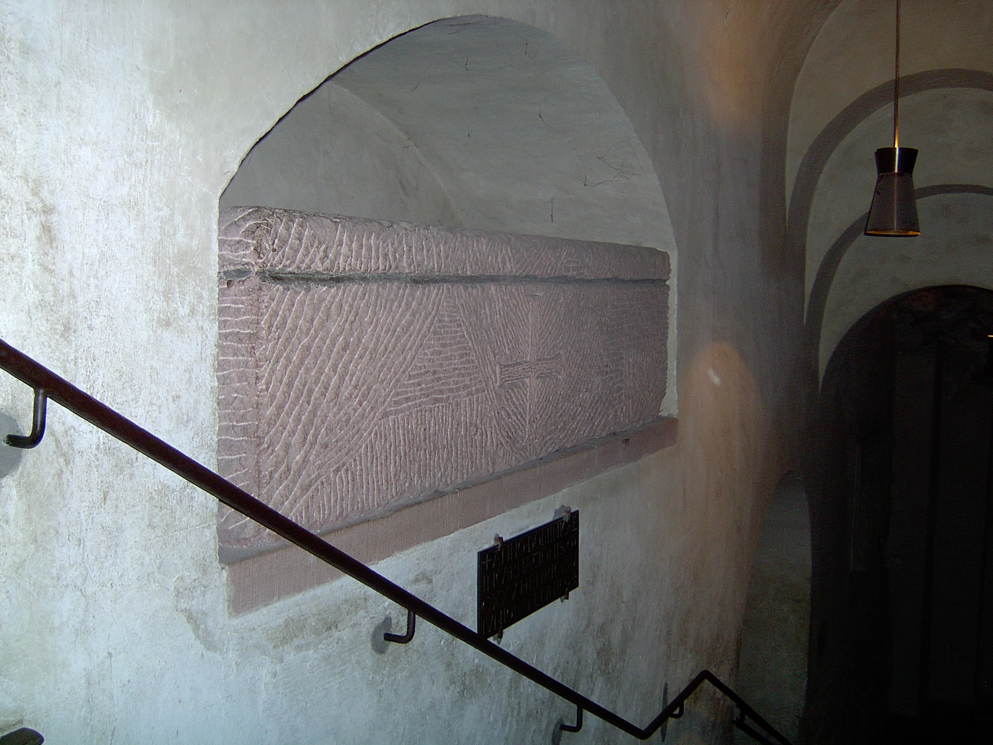 Beschreibung: Grablege Heinrich V. in der Krypta des Speyerer Dom Datum: 06.05.2005 Fotograf: Michail Jungierek, dank an Ulf Spielmann für die Zurverfügungstellung der Kamera und an Jörg Uhlmann für die Hilfe bei den Aufnahmen